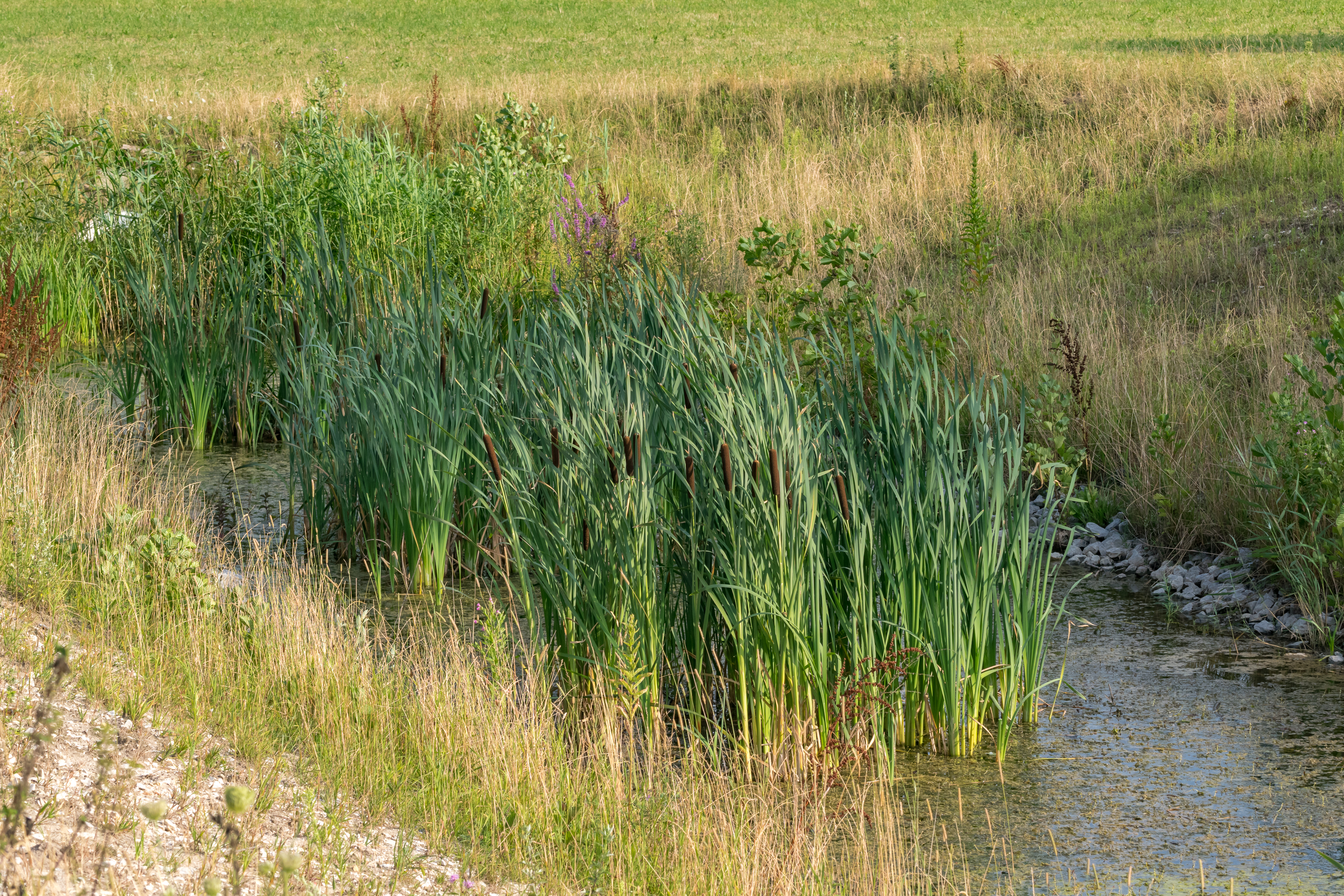 Tallesee bei Schloß Neuhaus, LSG Seen in der Lippeniederung, Kreis Paderborn